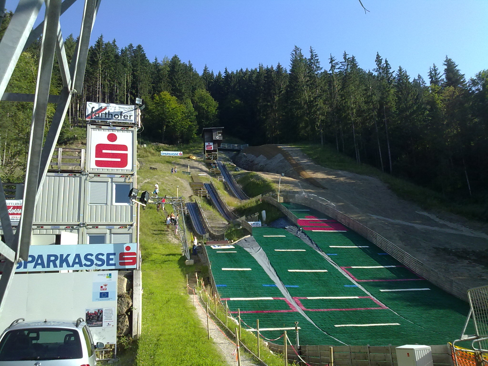 Sprungzentrum Wörgl